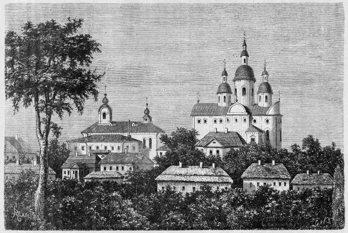 Вигляд Красногірського монастиря, Полтавської губернії.